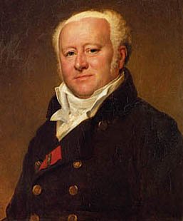 Jean-Nicolas Corvisart (February 15, 1755–September 18, 1821) was an important figure in the history of French medicine.